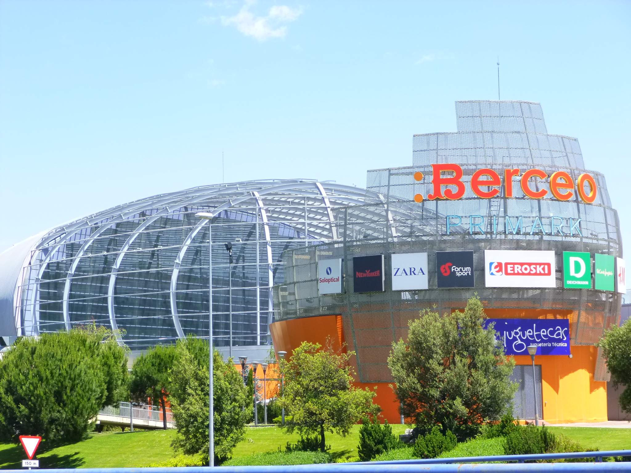 Centro Comercial Berceo (Logroño)